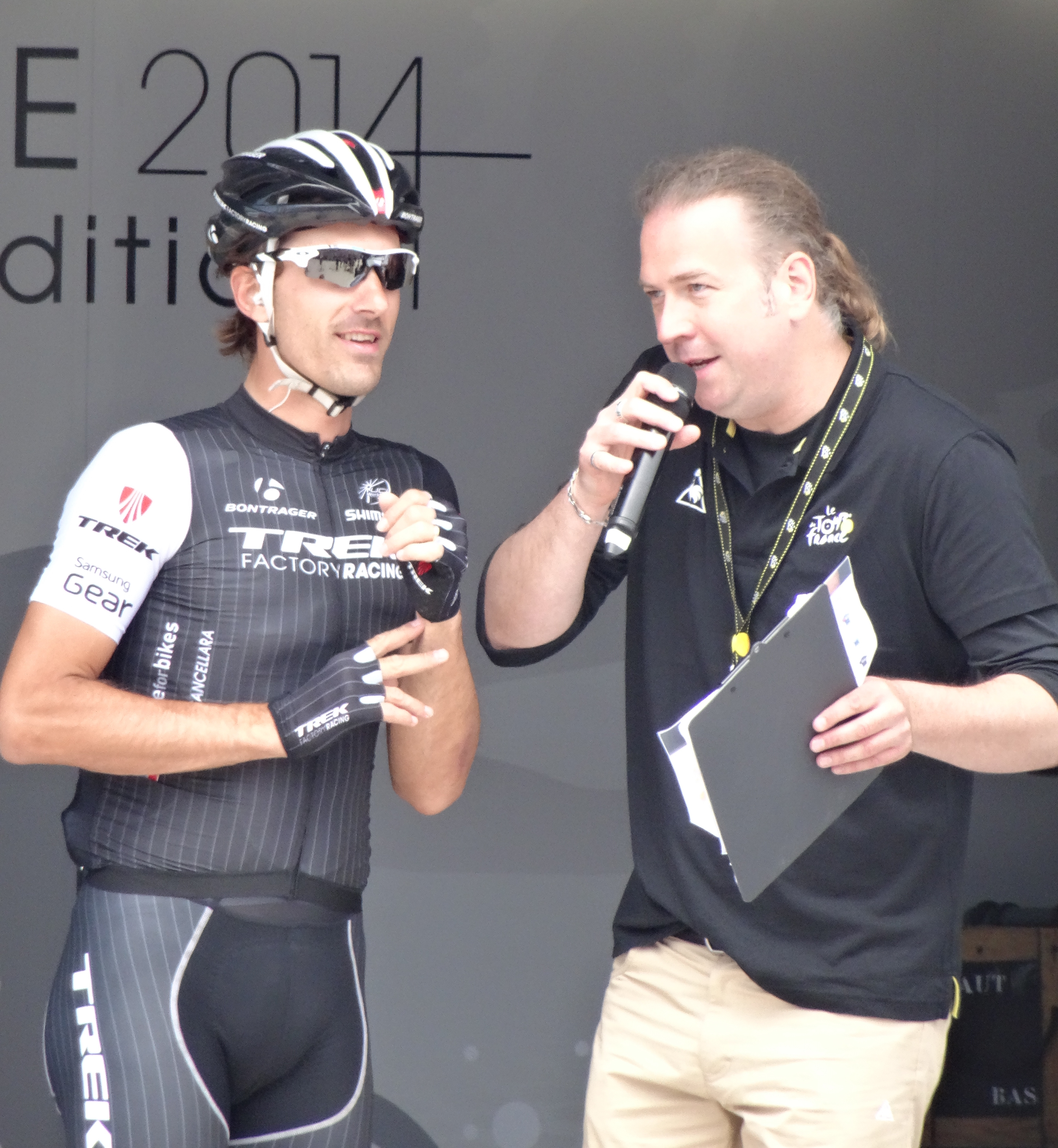 Reportage photographique réalisé le mardi 8 juillet à l'occasion du départ de la quatrième étape du Tour de France 2014 au Touquet-Paris-Plage, Nord-Pas-de-Calais, France.